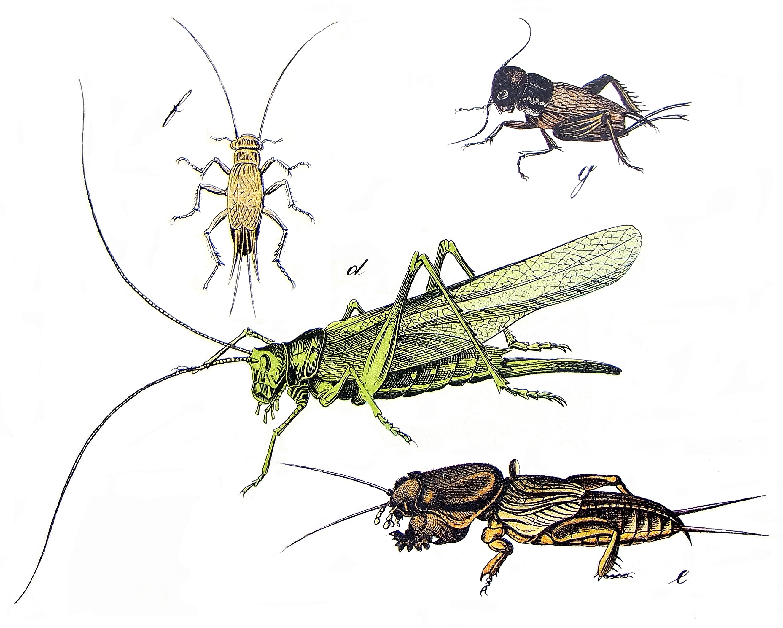 Derivate of Table XXIV of "Naturgeschichte des Tierreichs für Schule und Haus Ensifera f:Acheta domesticus g: Gryllus campestris d: Tettigonia viridissima e: Gryllotalpa gryllotalpa